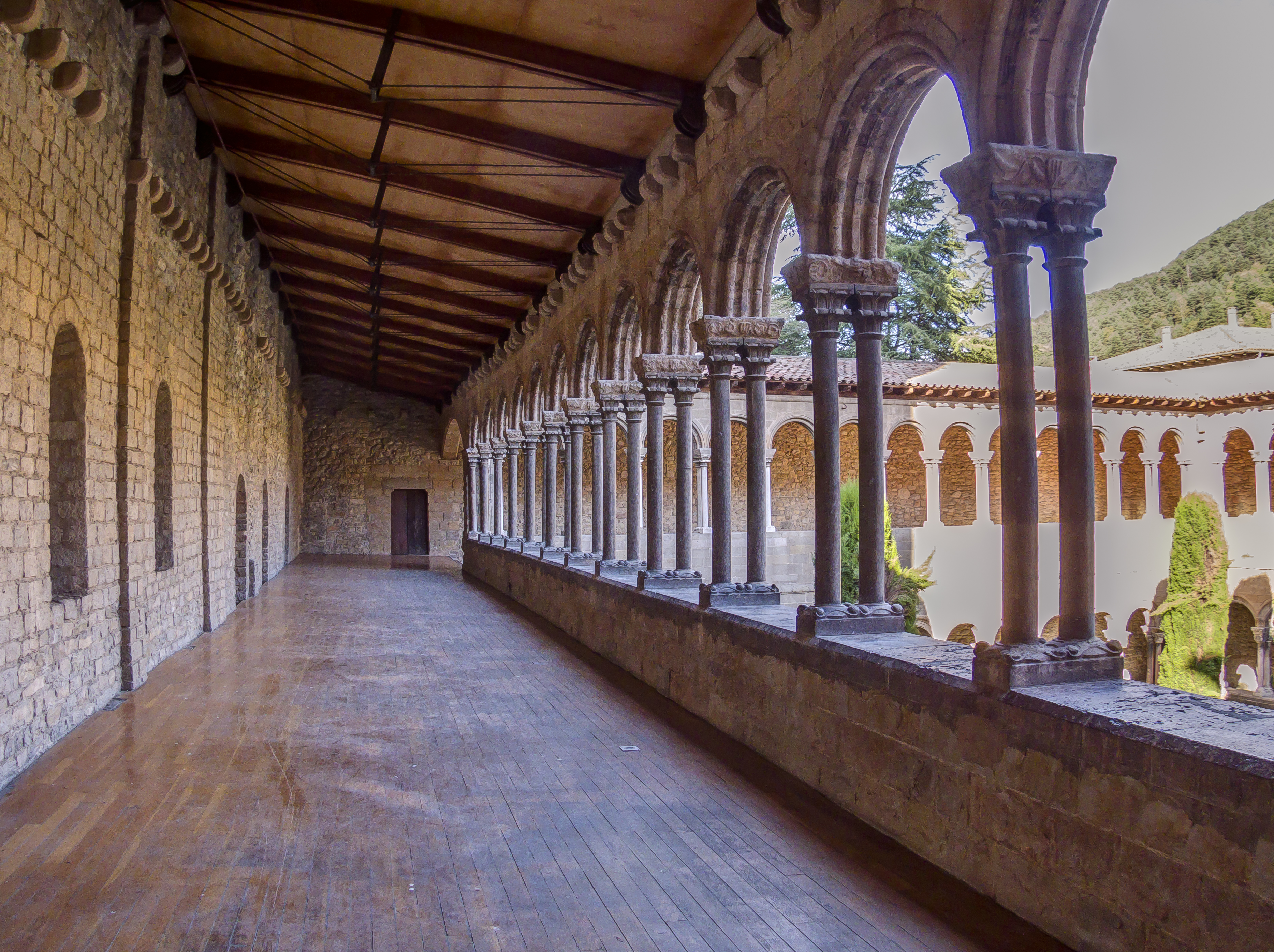 Monestir de Santa Maria de Ripoll_14